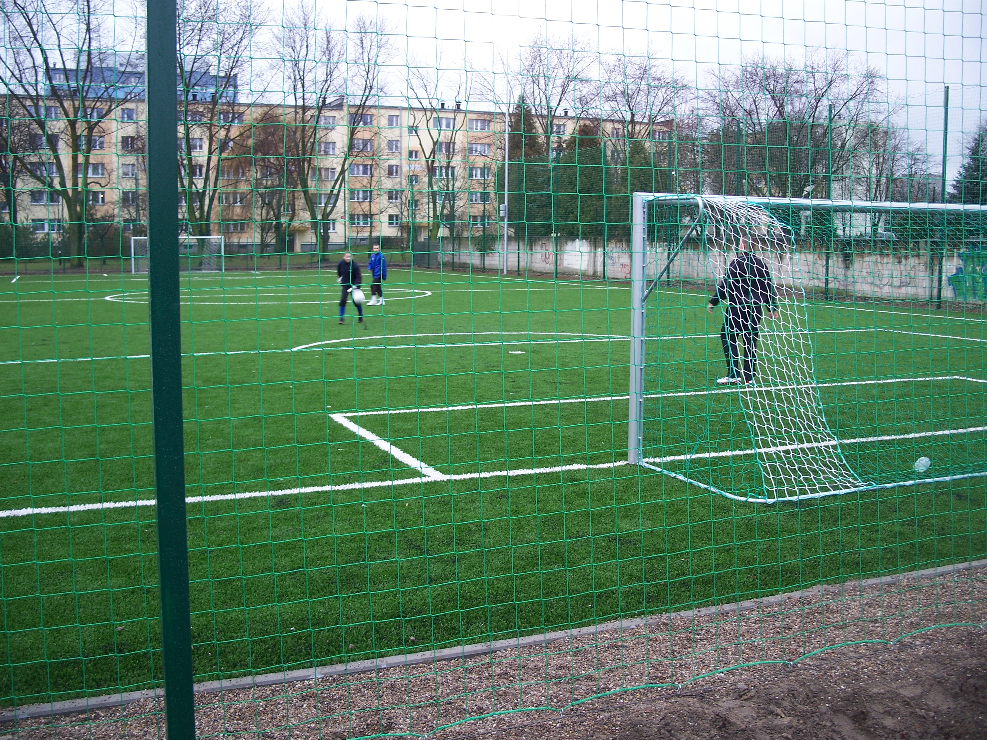 Orlik 2012 - boisko piłkarskie przy Szkole Podstawowej nr 41 w Łodzi